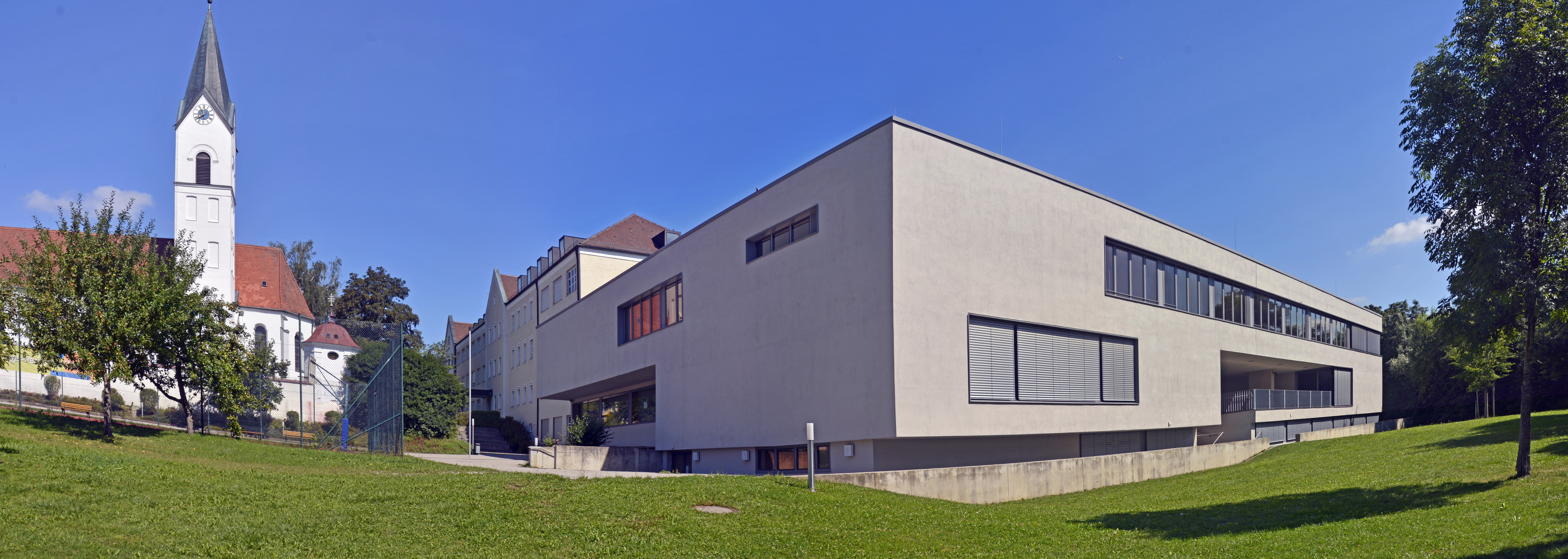 Erzbischöfliche Theresia-Gerhardinger-Realschule Weichs - Panorama